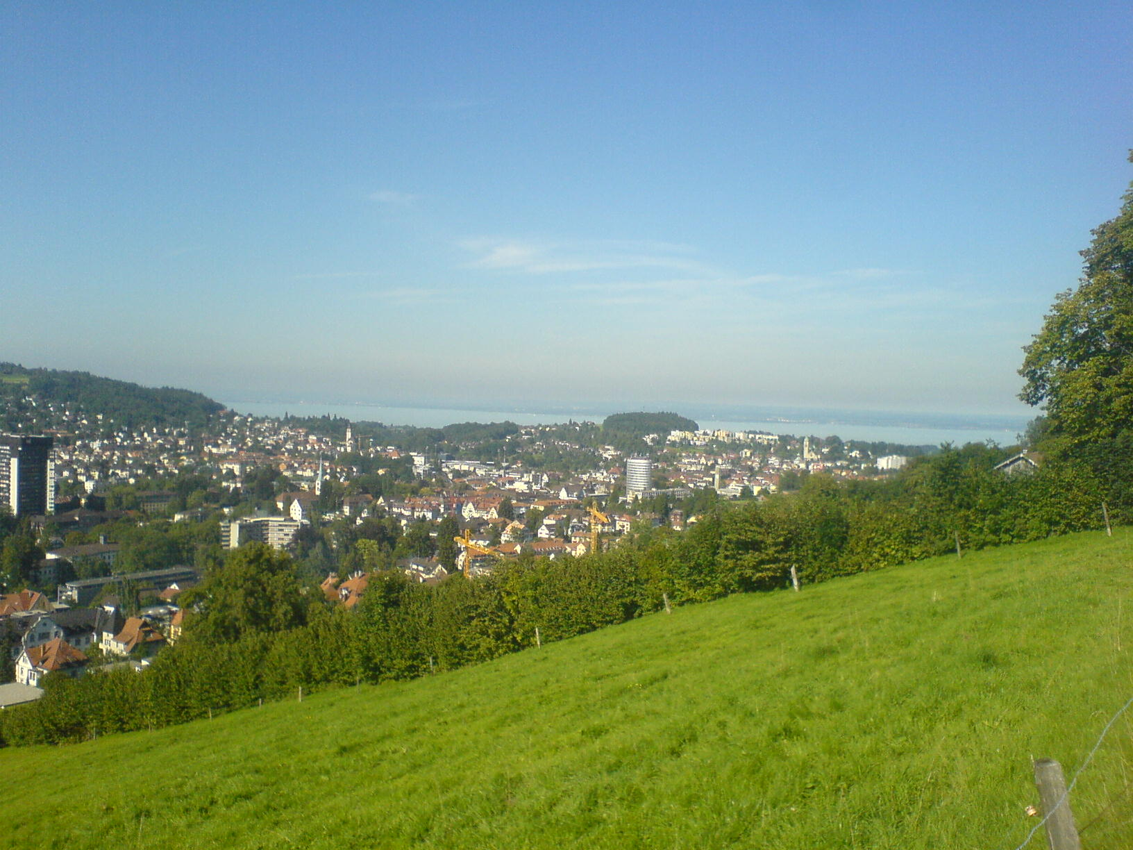 Panorama du centre ville en direction du Lac de Constance.